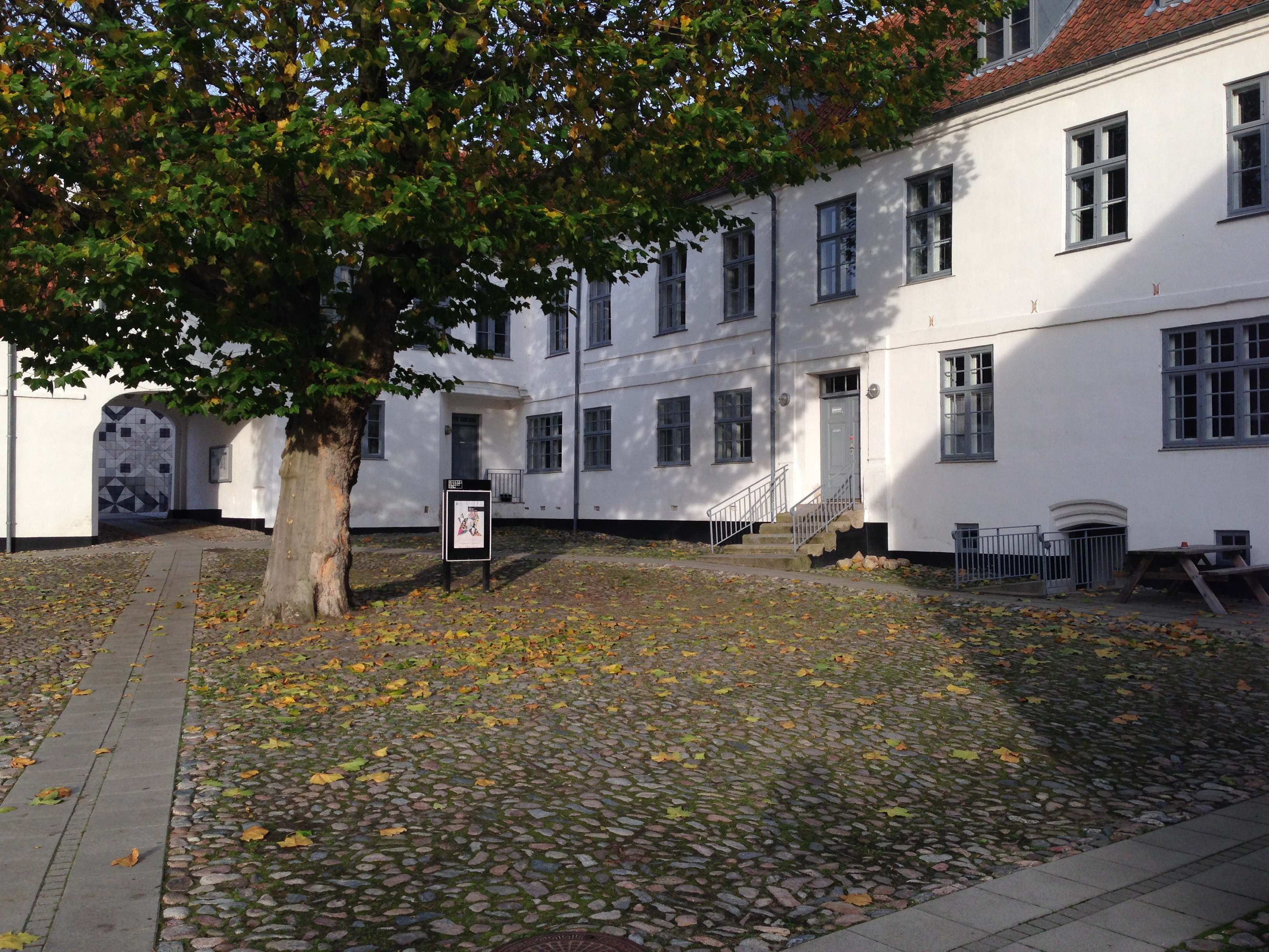 Viborg Kunsthal